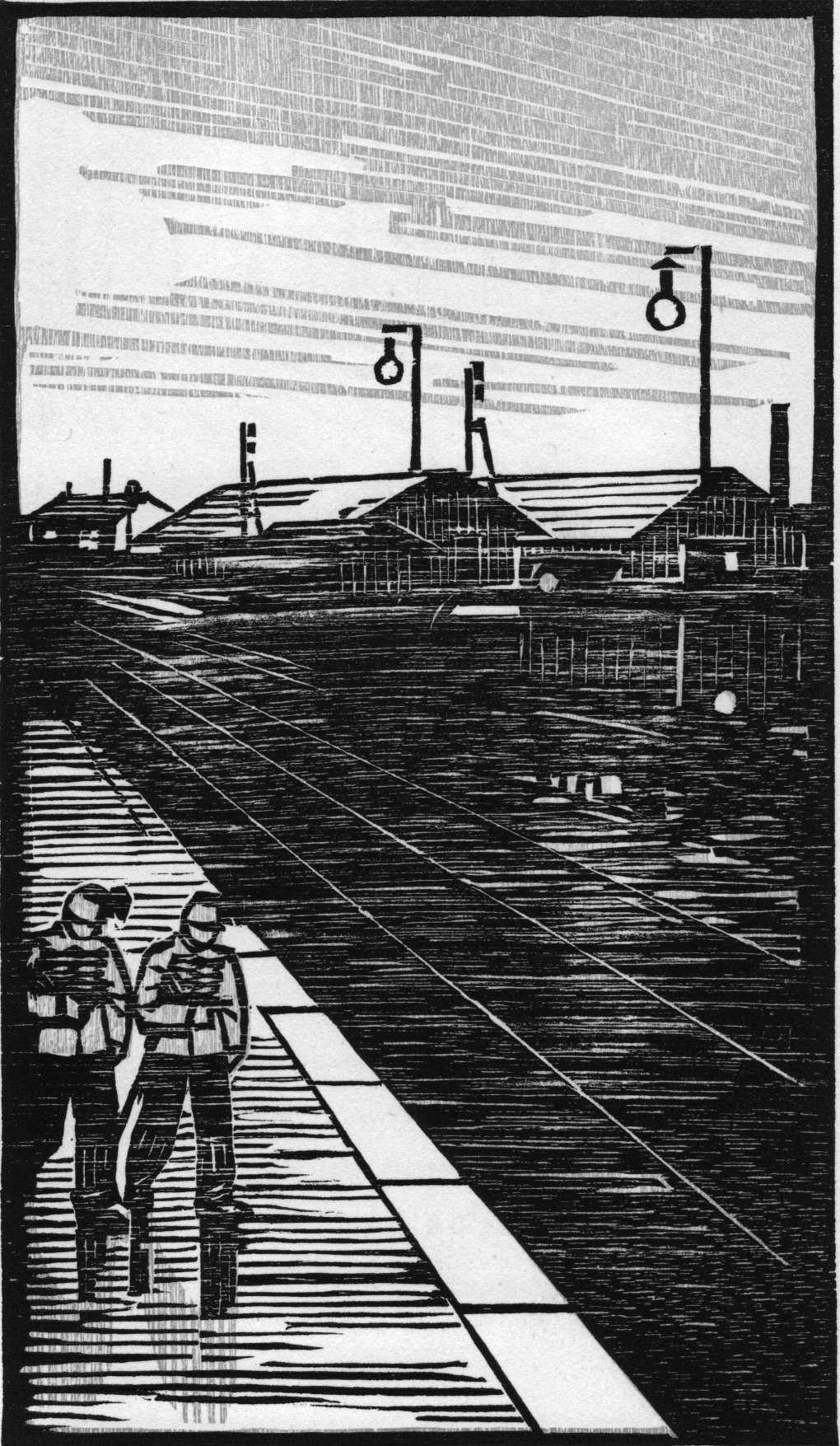 Frontispice du train de 8h47 de George Courteline, orné de bois gravés par Carlègle : Paris - Société littéraire de france - 1917 (ce scan noir et blanc ne donne pas un rendu un peu bleuté pour le ciel)